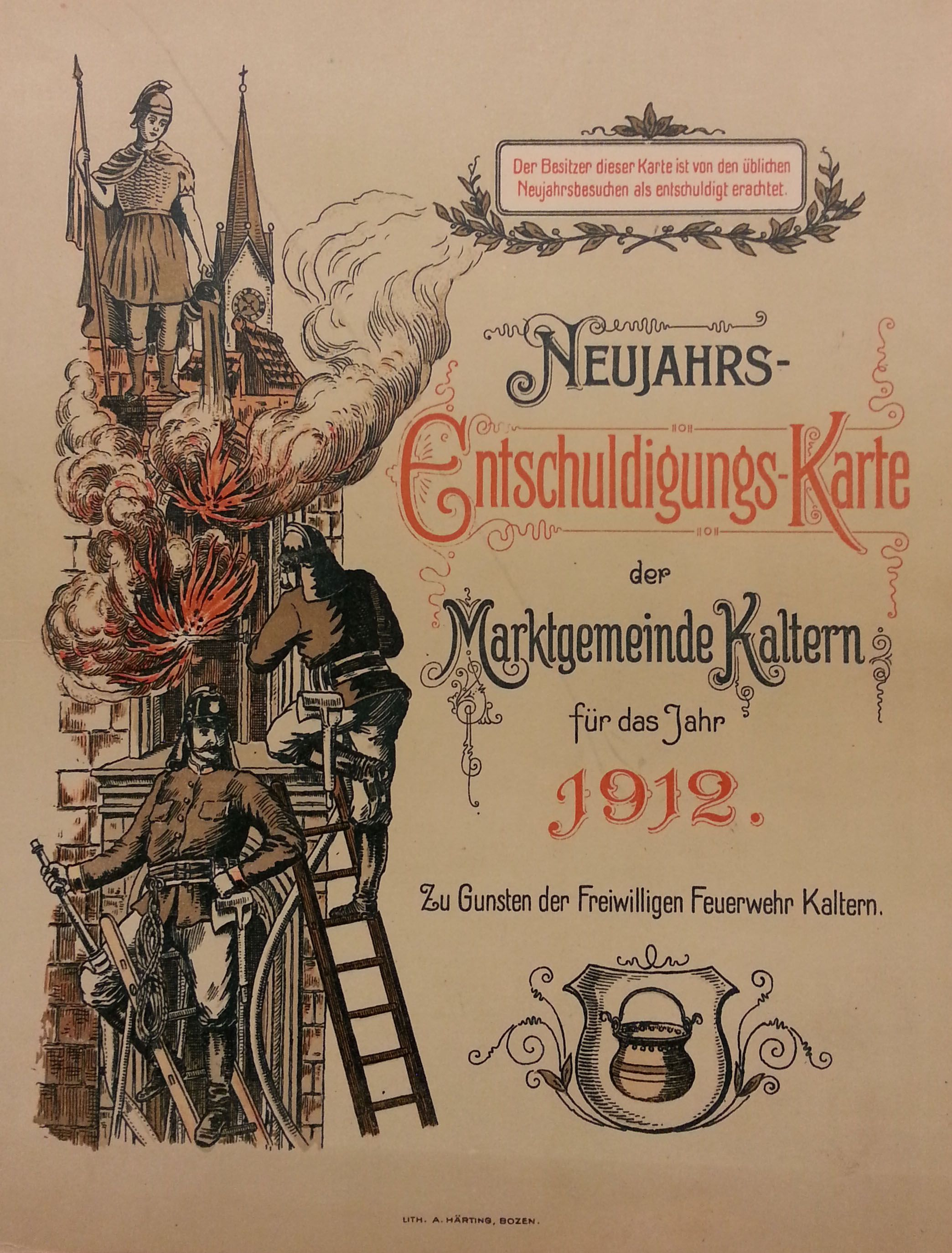 Neujahrskarte der Feuerwehr Kaltern:Die Feuerwehr ist anlässlich Neujahr sammeln gegangen. Wenn man zu diesem Zeitpunkt nicht zu Hause war, konnte sich der Bürger bereits mit dem Kauf der Karte "freikaufen"